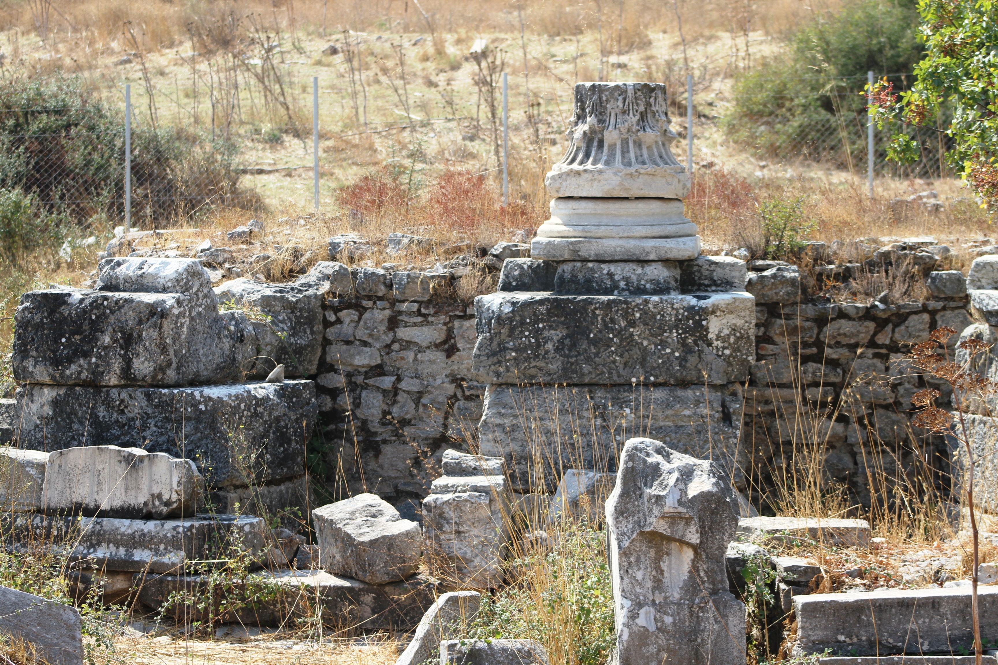 Ruínas dos banhos gregos na entrada de Éfeso